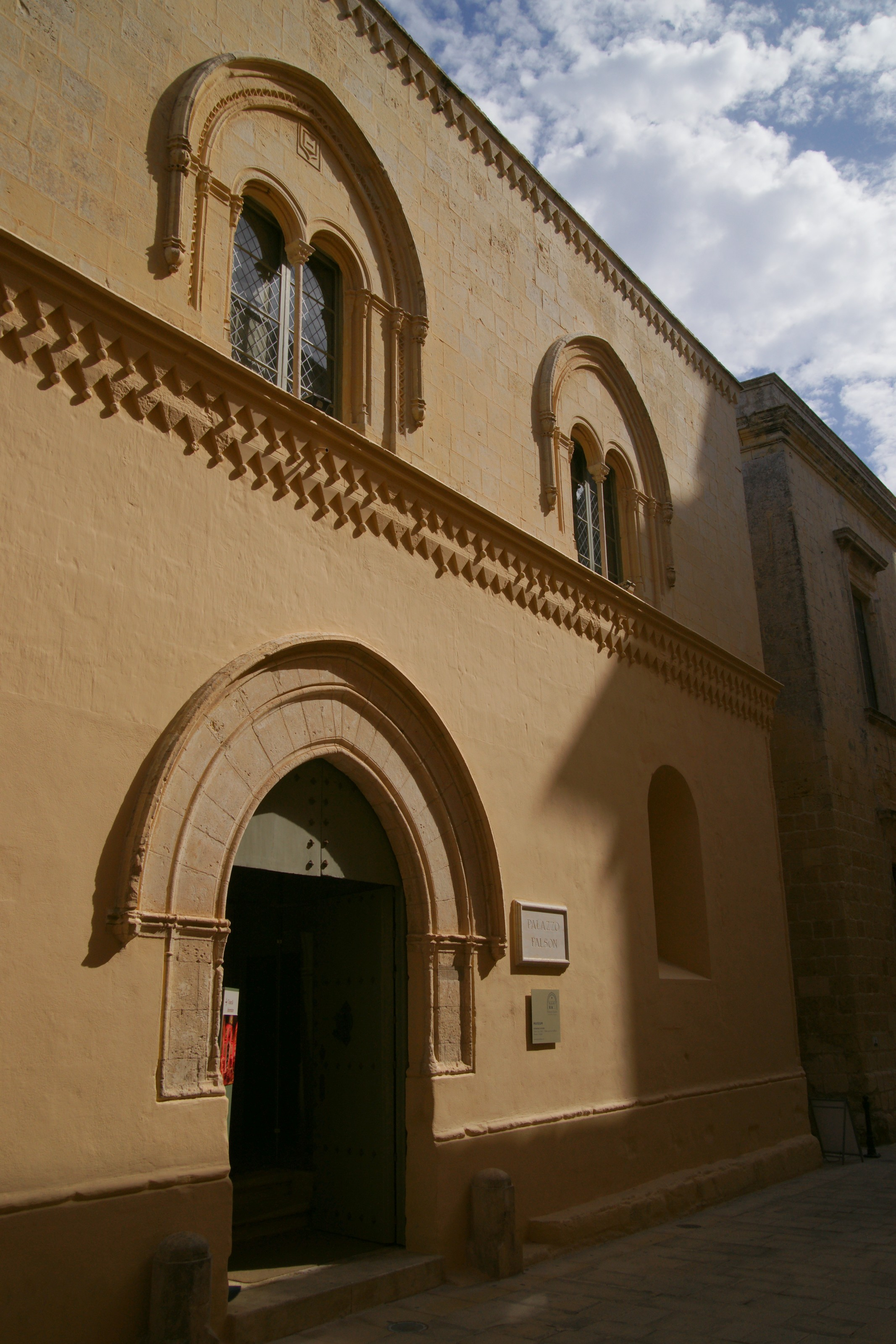 Palazzo Falson